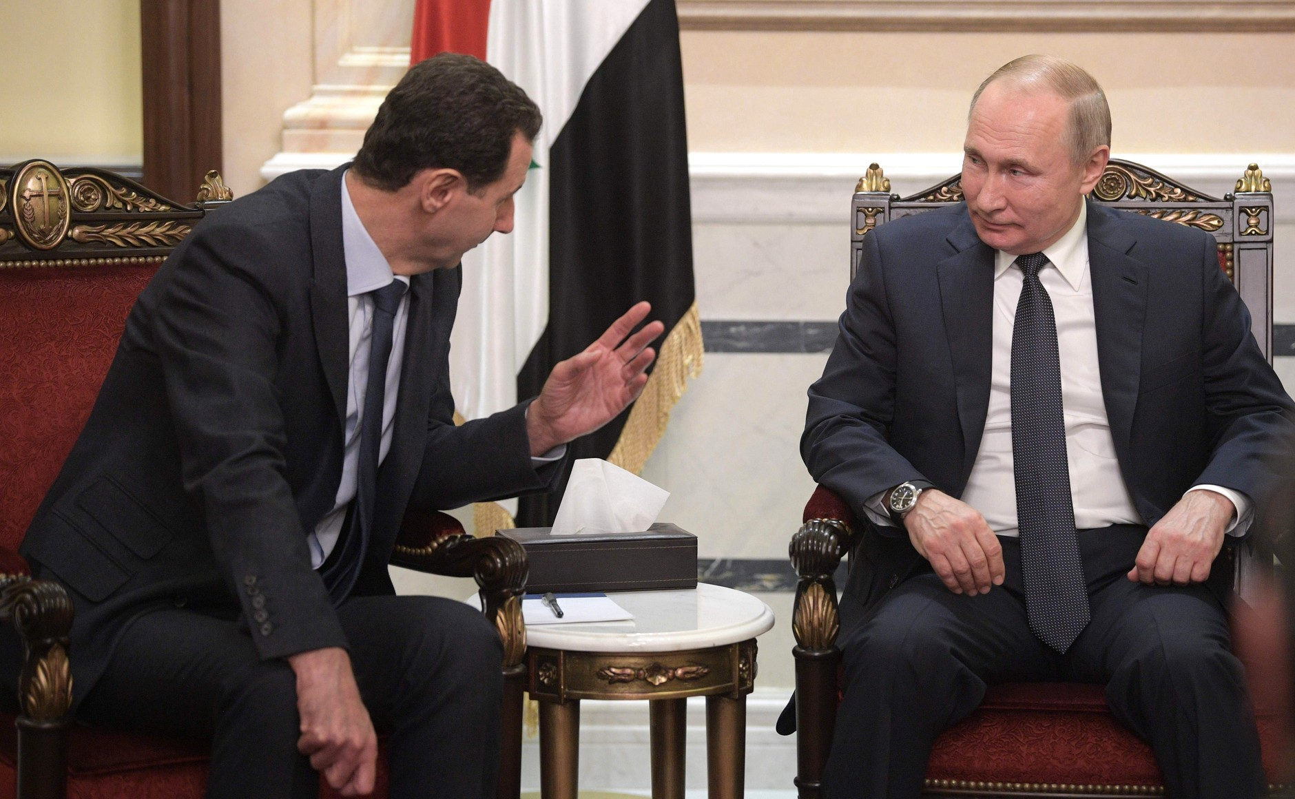 Башар Асад и Владимир Путин в ходе встречи с патриархом Антиохийским и всего Востока Иоанном X.